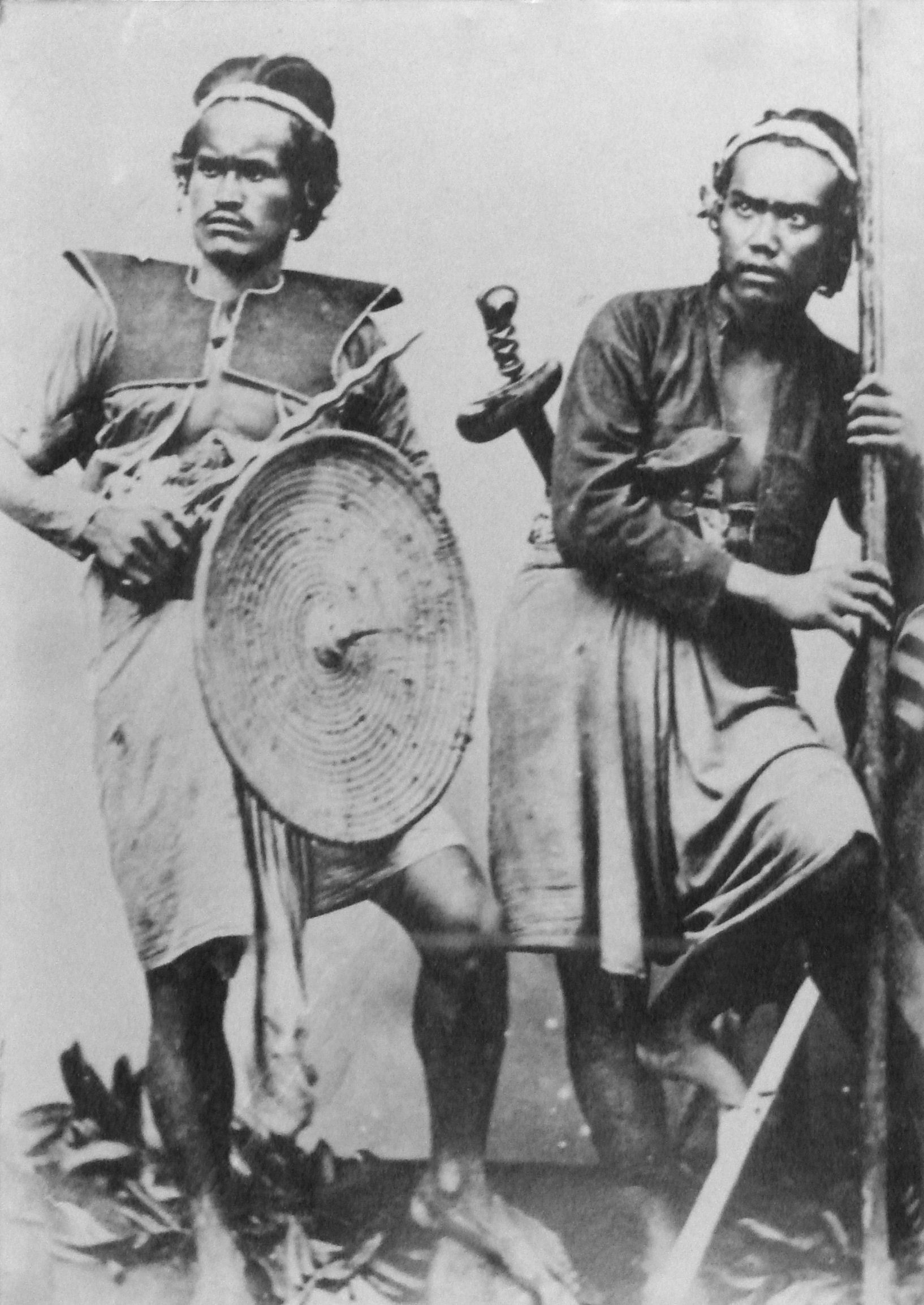 Balinese soldiers (1880s)